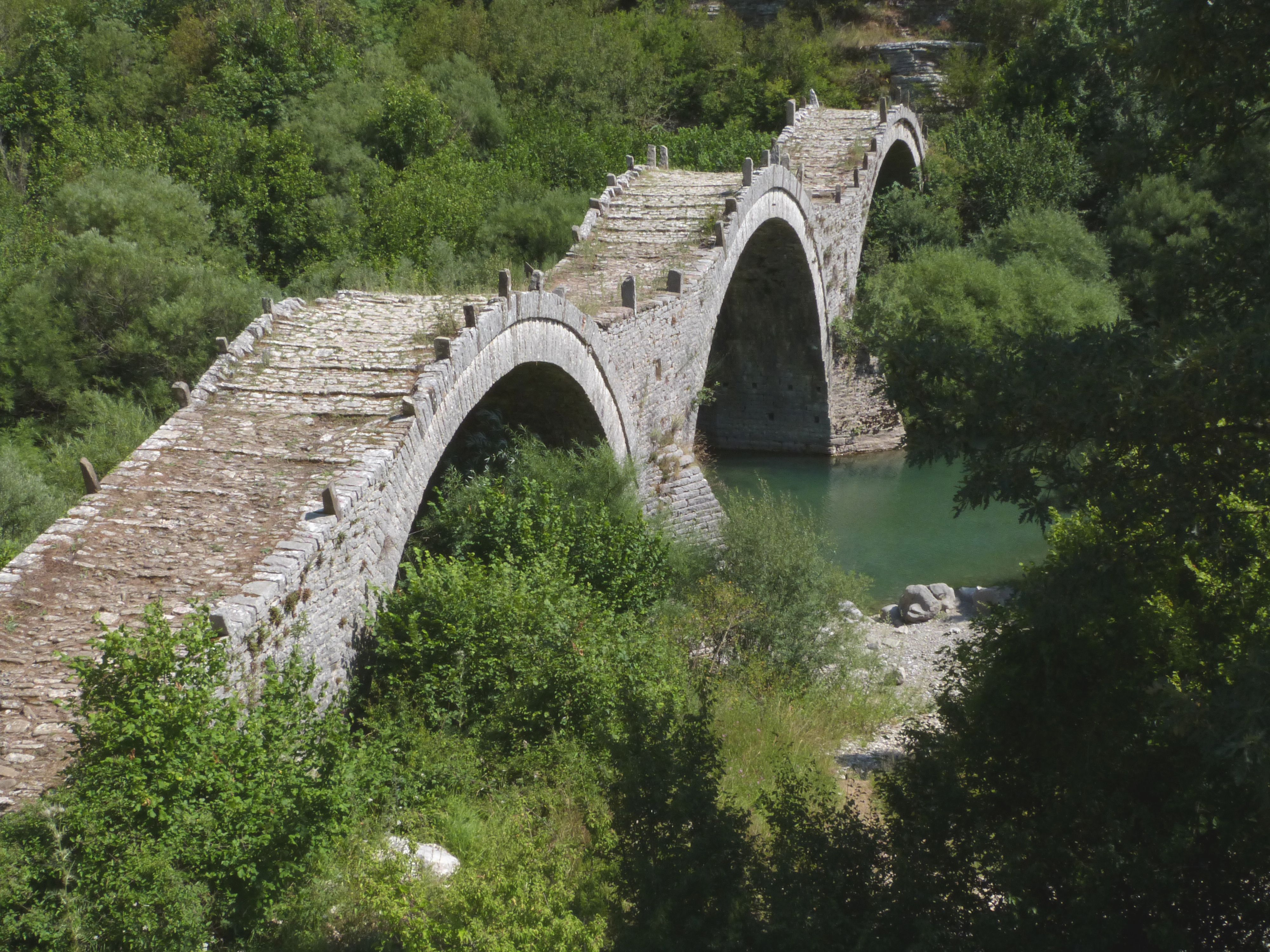 Brücke bei Kipi/Epirus